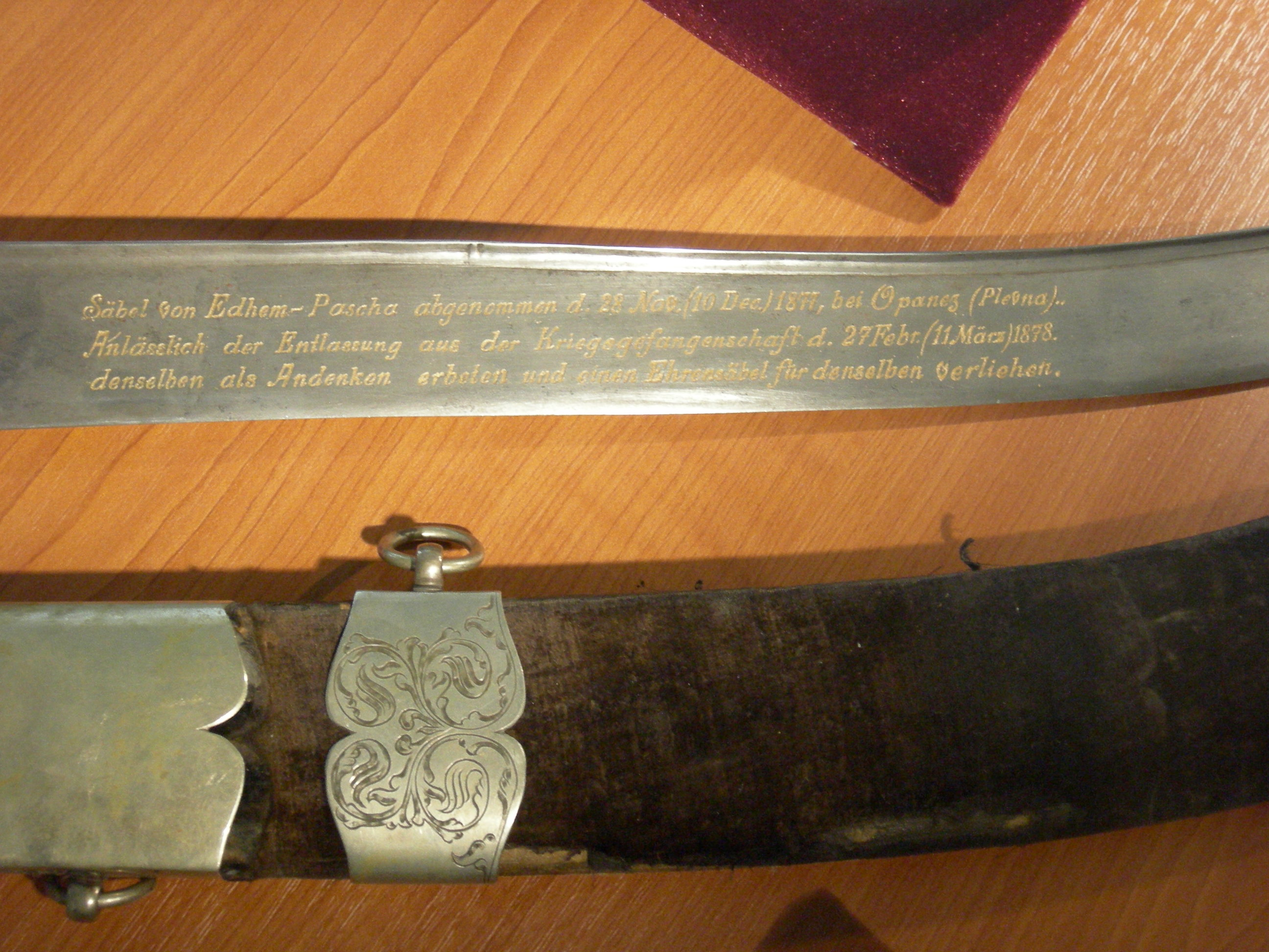 Sword surrendered by Ethem Pasha after the Siege of Pleven. Inscription, in German, reads "Säbel von Edhem-Pascha abgenommen d. 28 Nov. (10 Dec.) 1877, bei Oponez (Plevna).. Anlässlich der Entlassung der Kriegsgefangenschaft d. 27 Feb. (11 März) 1878. denselben als Andenken erbeten und einen Ehrensäbel für denselben verliehen." Part of a temporary exhibit on Carol I of Romania, at National Museum of Romanian History, Bucharest.